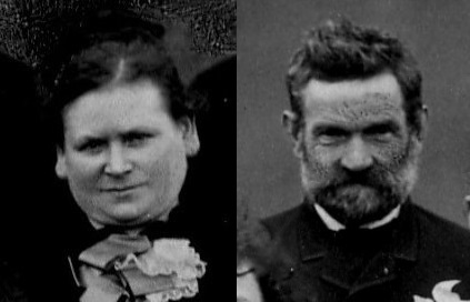 Menne, Robert und Maria geb Nolte, Domänenpächter auf Gut Kemperfeld